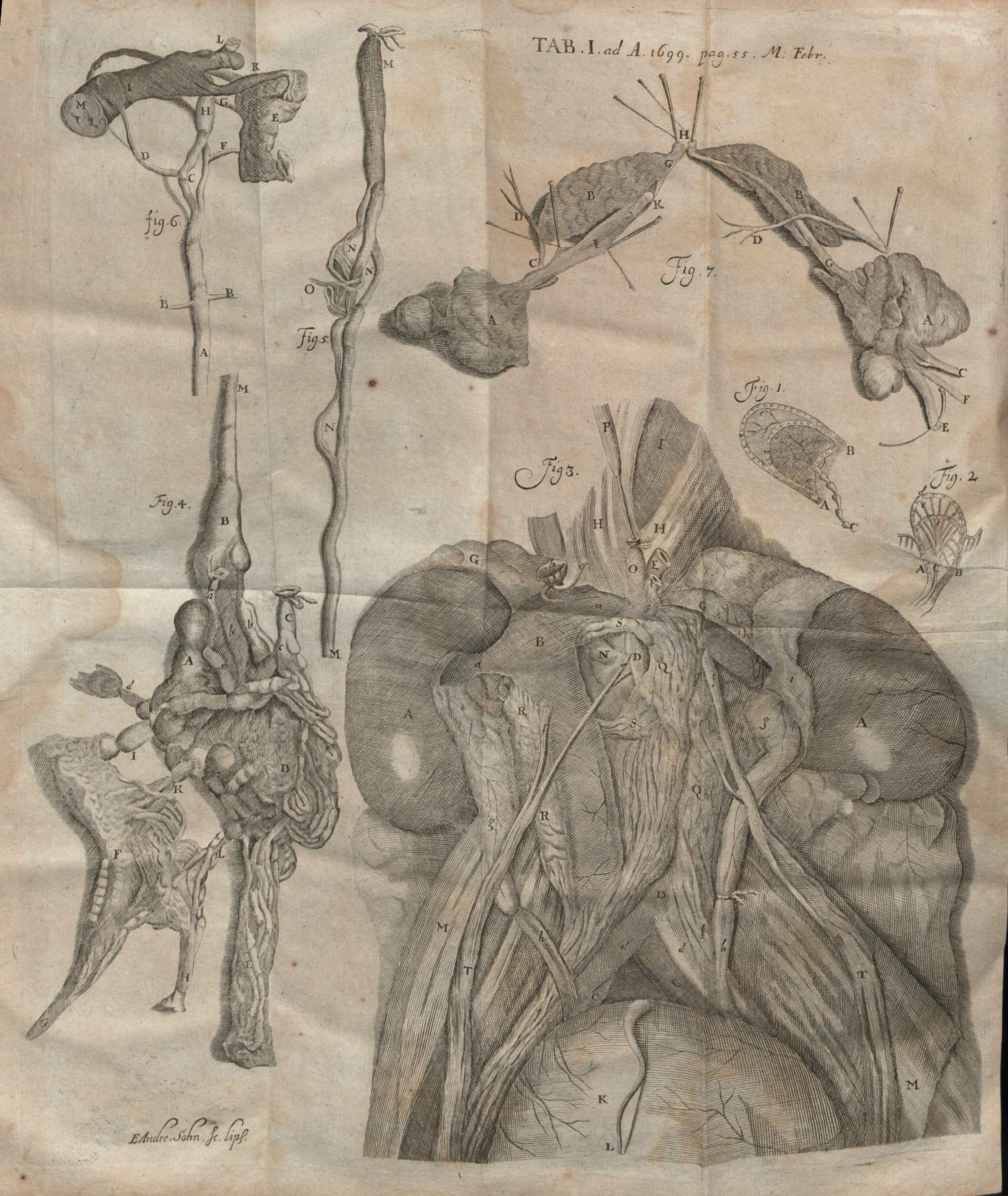 Illustration